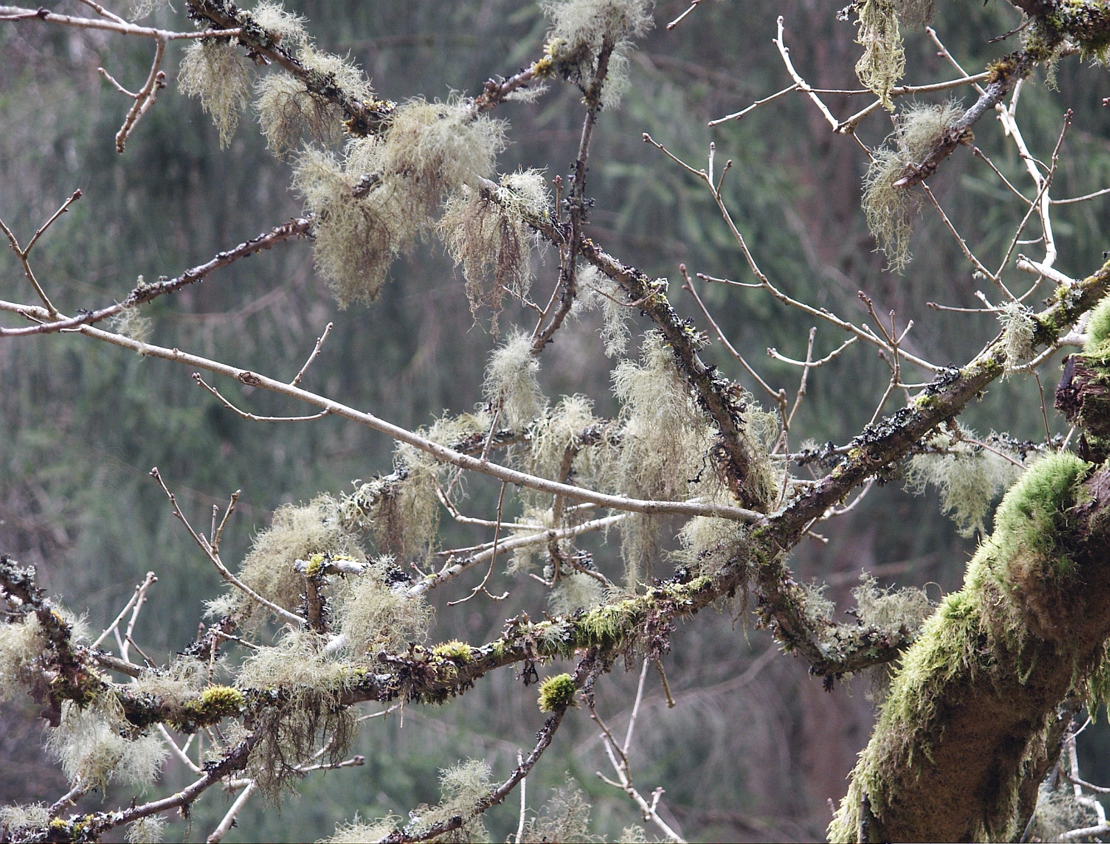 Usnea filipendula, Schwäbisch-Fränkischer Wald, Germany